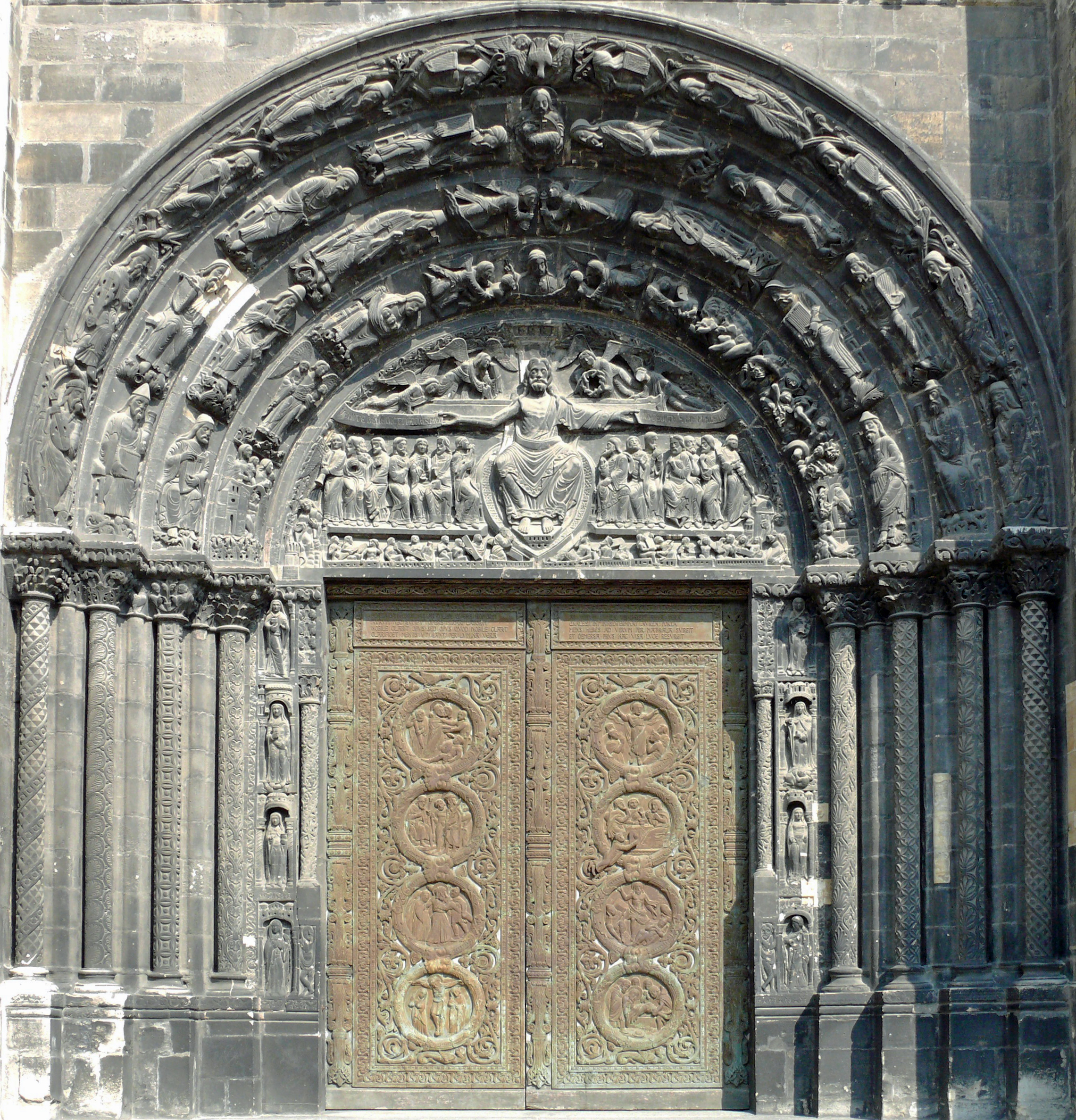 Saint-Denis - Basilique Saint-Denis - Portail central avant restauration